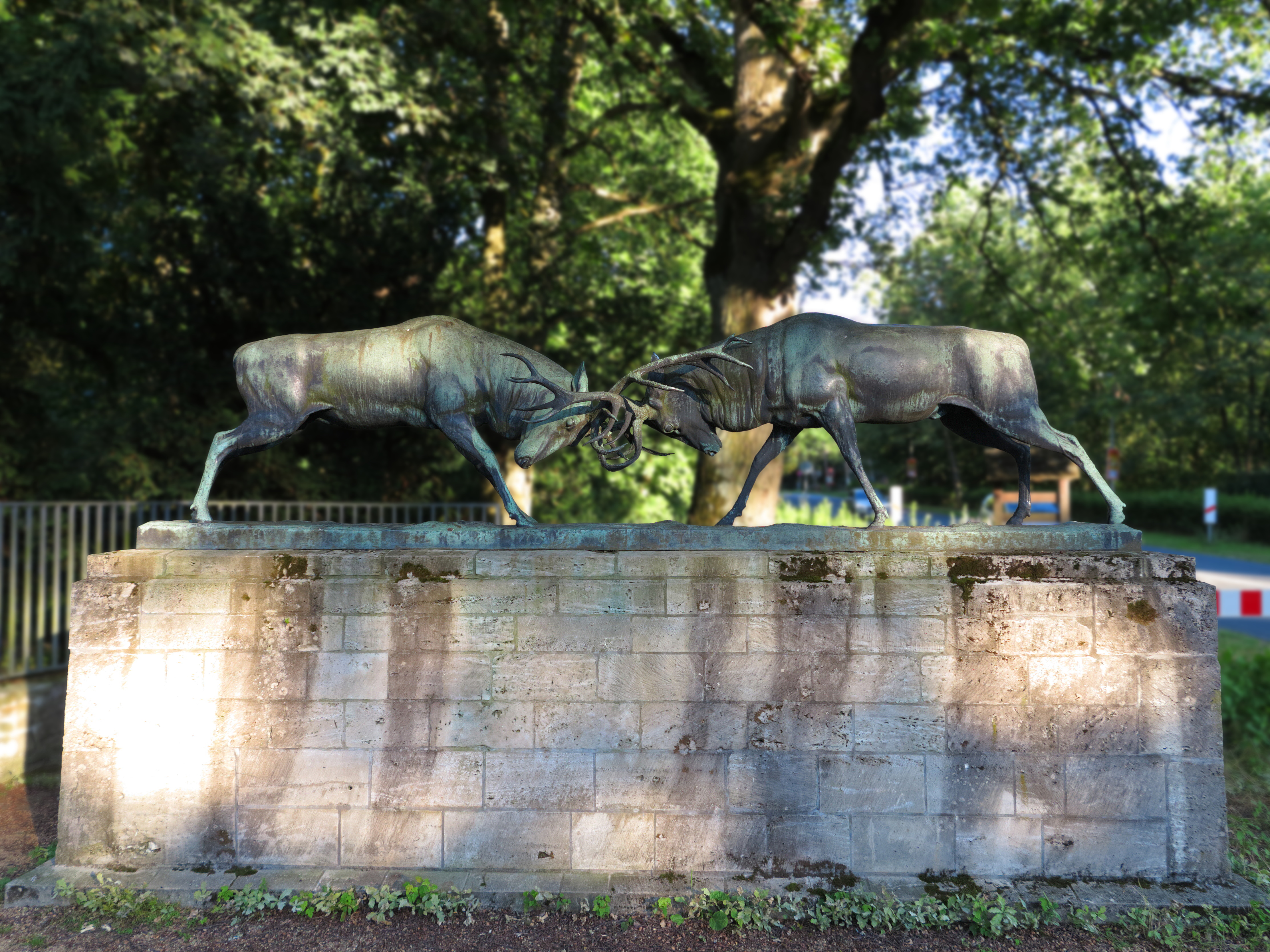 Braunschweig: Die Skulptur "Kämpfende Hirsche" am Eingang des Jägerhofs, Entwurf: Johannes Darsow, Ausführung: Martin u. Piltzing, Berlin